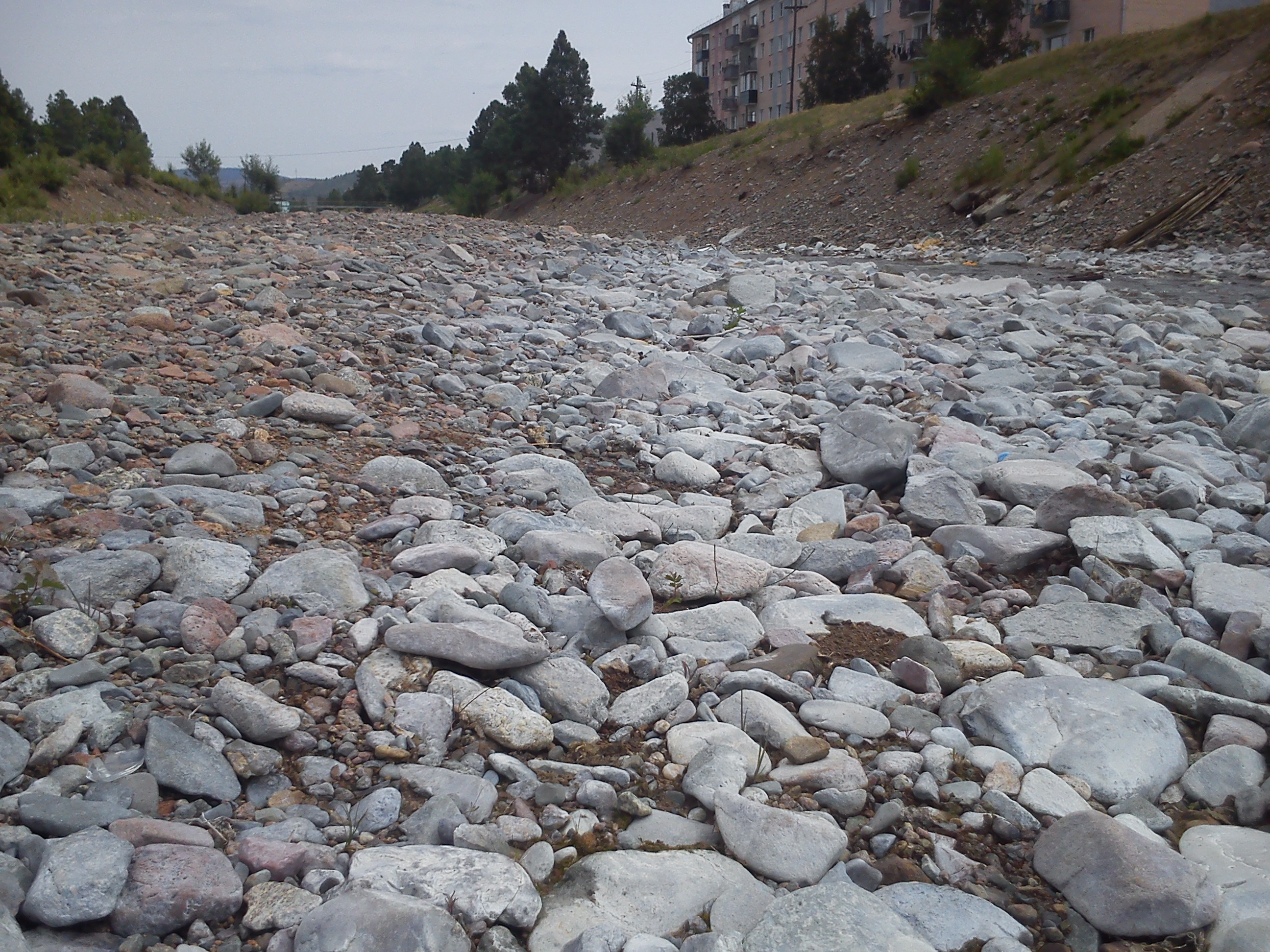 Прибрежный галечник на речке Модонкуль до уровня более высокой воды покрыт соляной коркой.